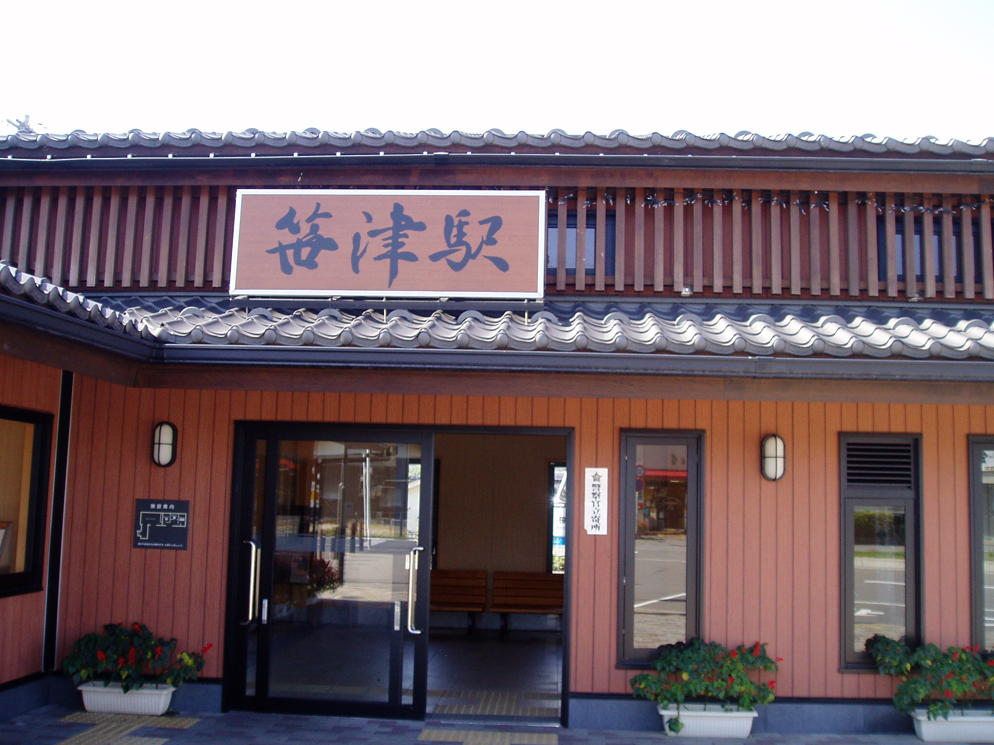 高山本線笹津駅の駅舎